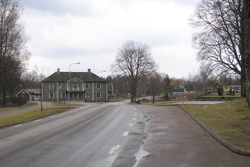 Väg 120 genom Häradsbäck, mot öster.